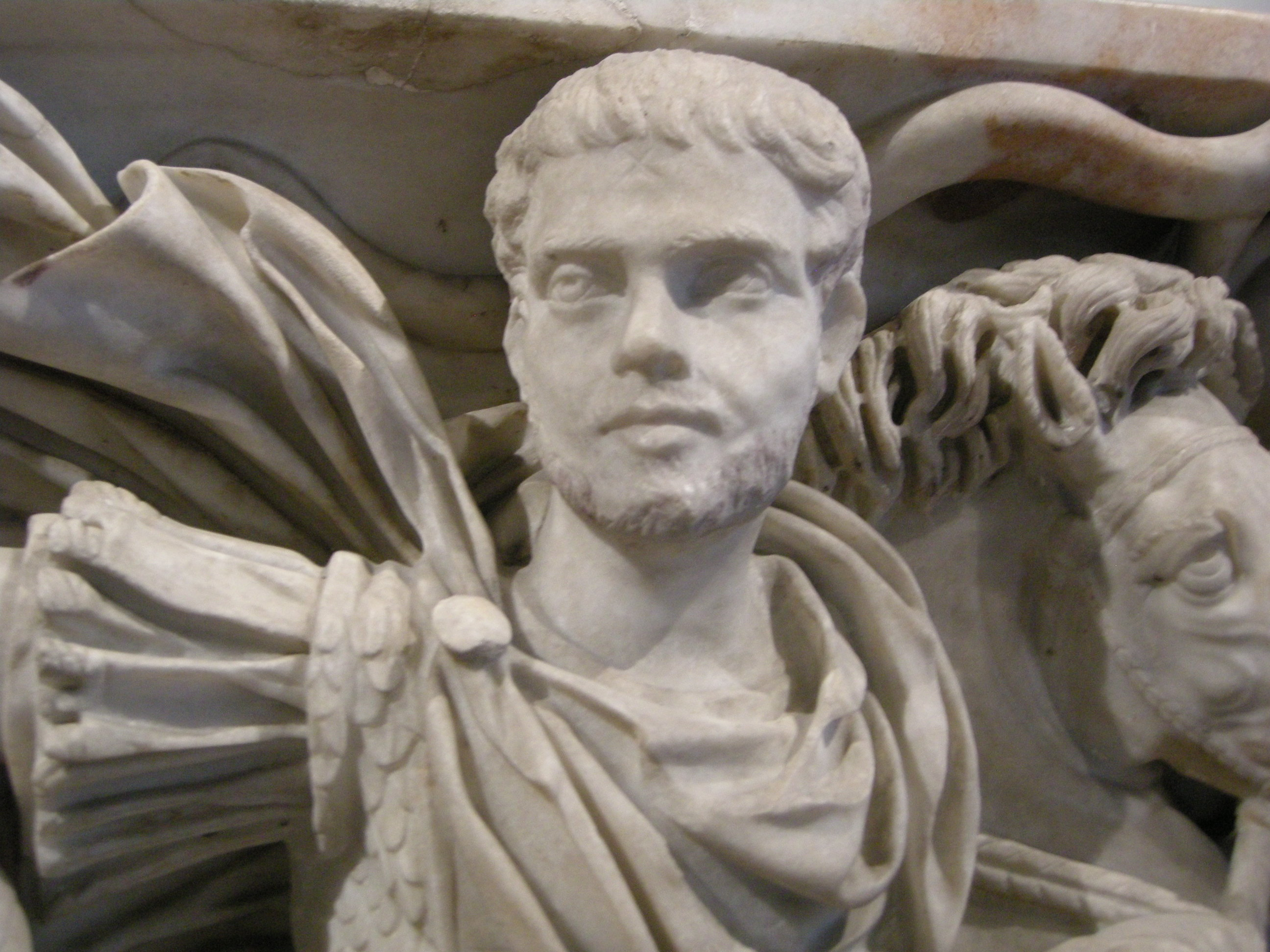 Grande Ludovisi sarcophagus